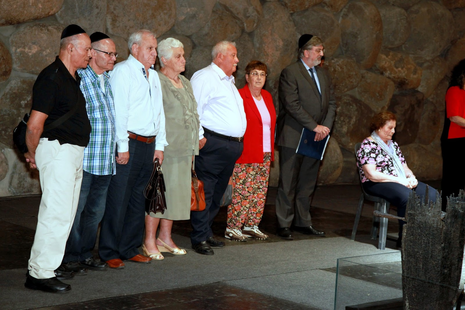 טקס הענקת הכרה כחסידי אומות העולם - ווליוטיס